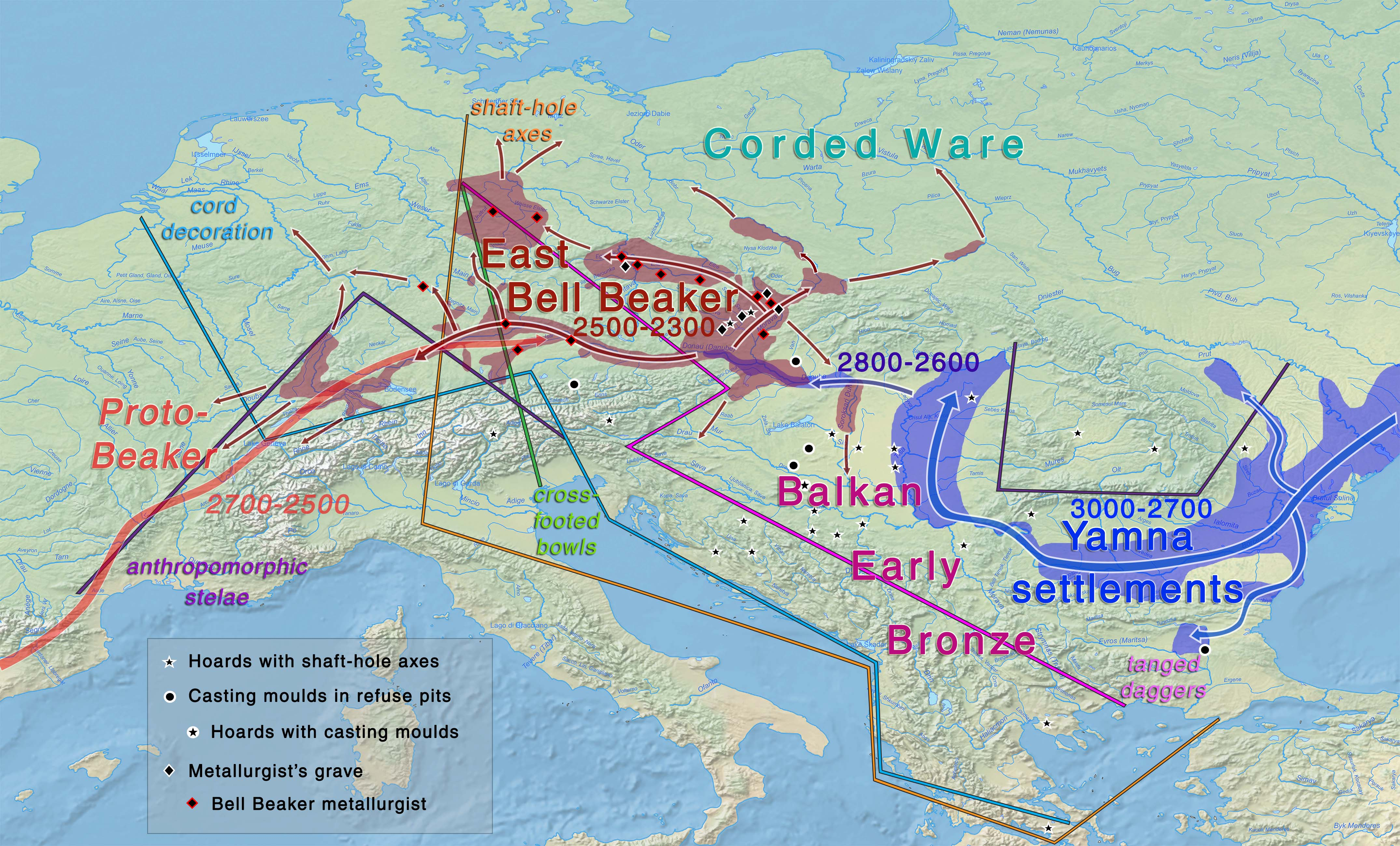 Миграции Ямной культуры и Культуры колоколовидных кубков